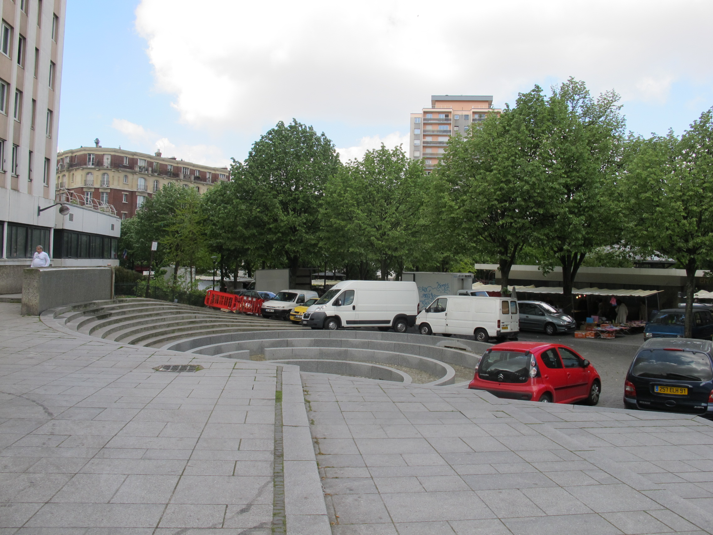 Place des Fêtes, Paris